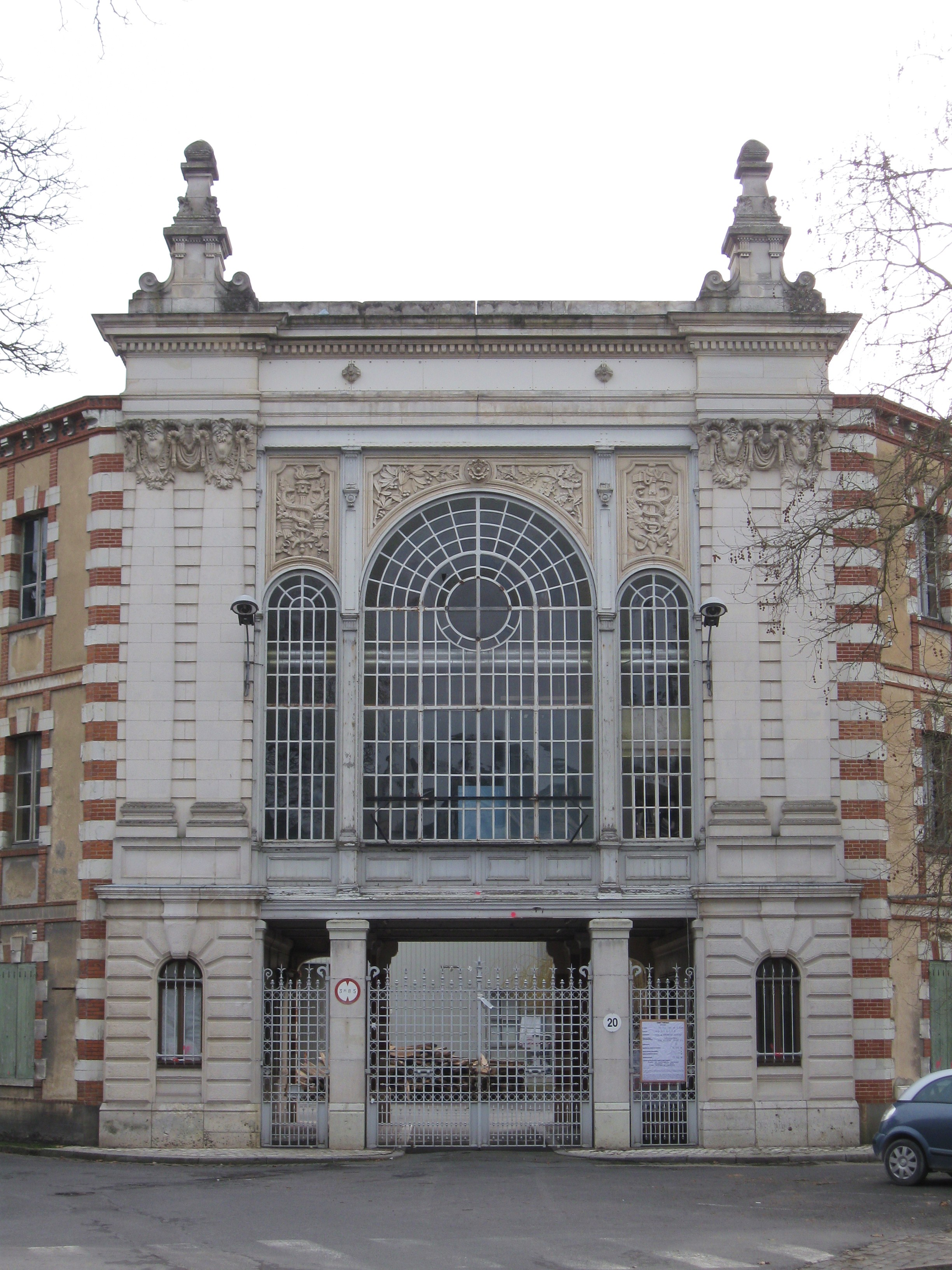 Entrée de l'ancienne usine Matra, Romorantin-Lanthenay, Loir-et-Cher, France